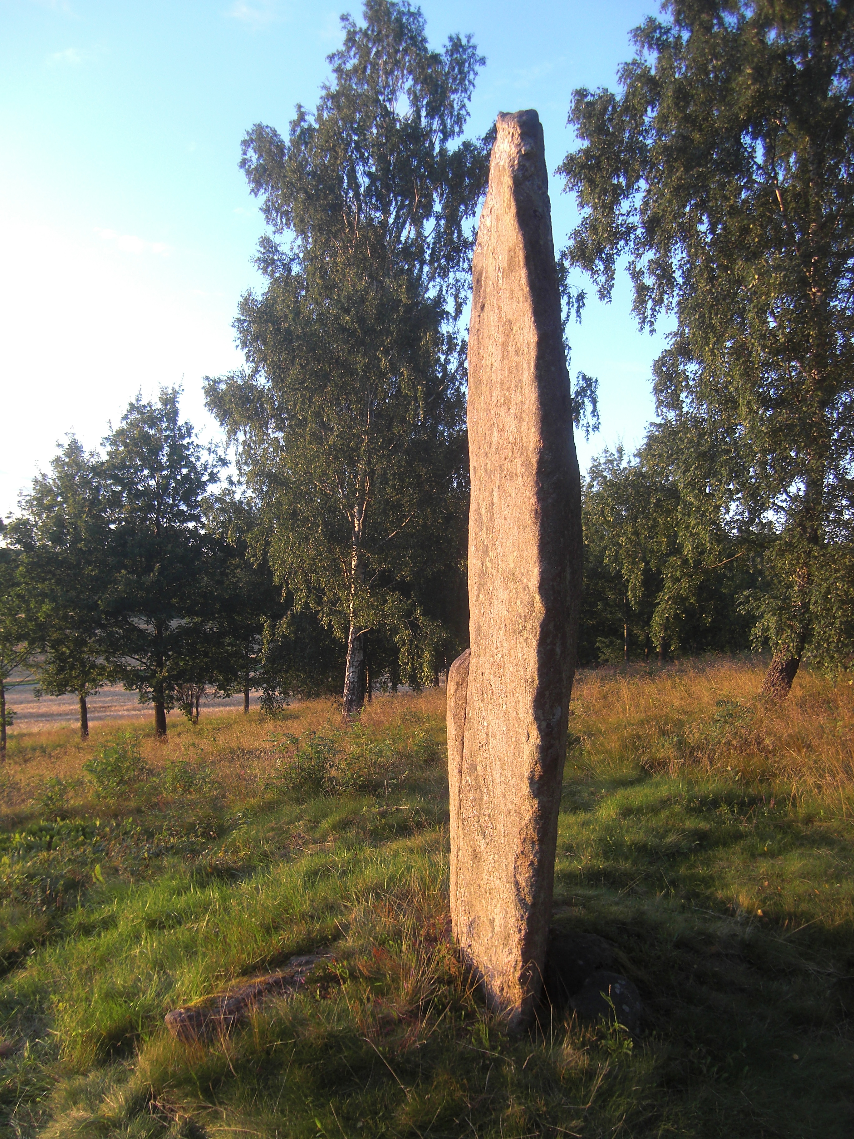 Rest sten på den nordvästra delen av gravfältet Nycklabacken (Raä-nr Tarsled 3:1) i Tarsleds socken i Kullings härad i Västergötland, Herrljunga kommun, f.d. Älvsborgs län, Västra Götalands län, Sverige.